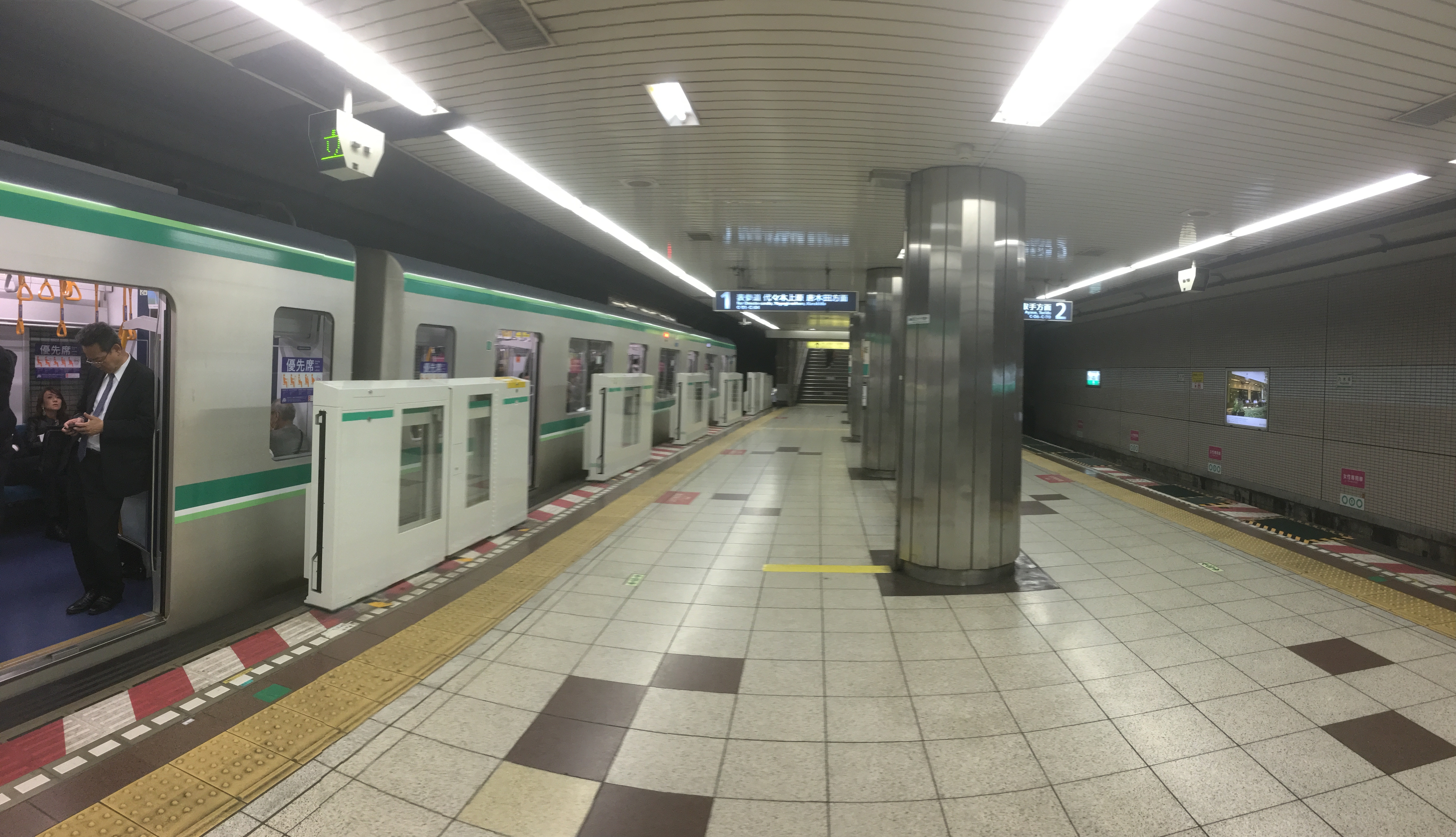 乃木坂駅 (Nogizaka Station)